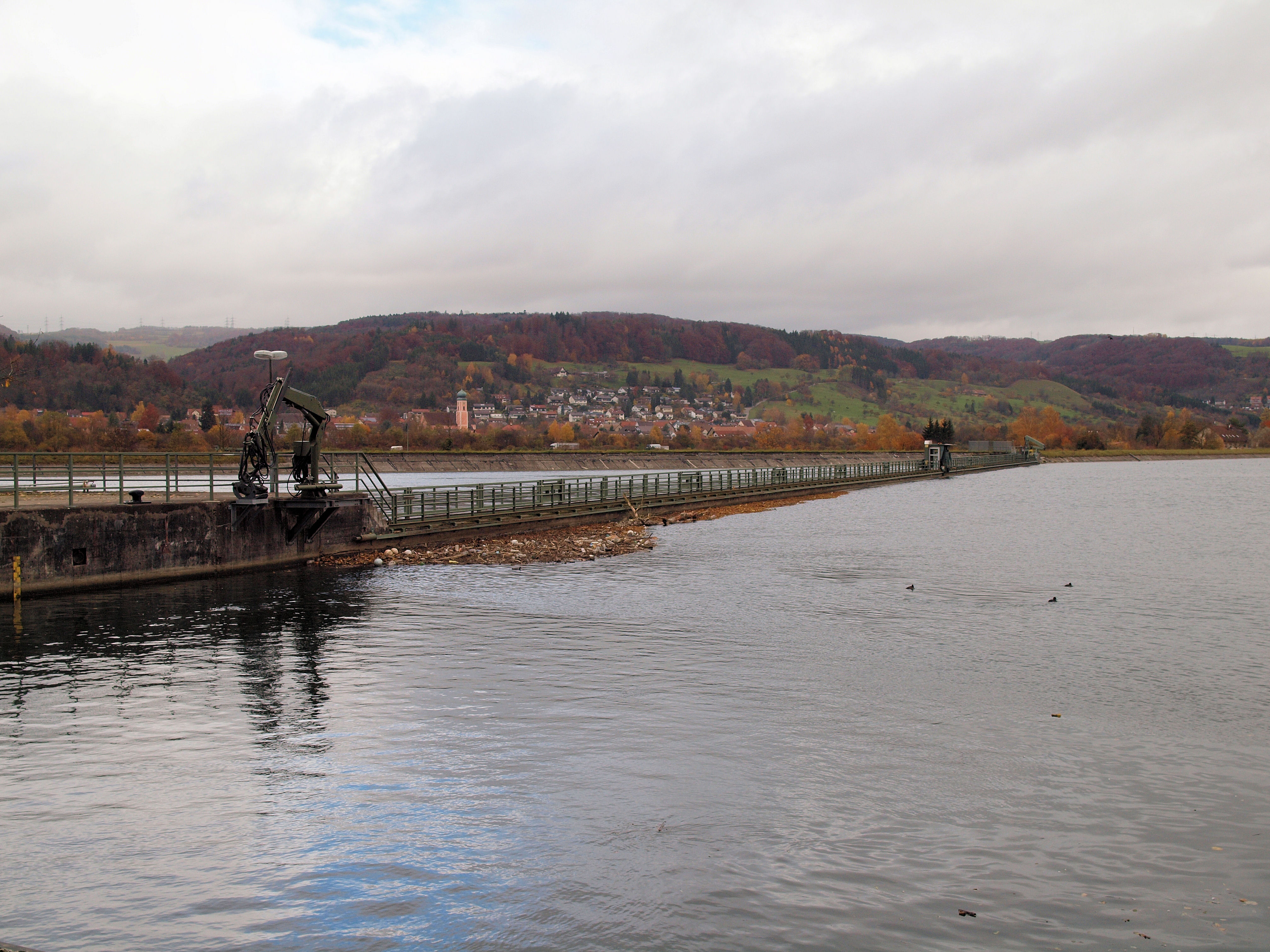 Wasserkraftwerk Albbruck-Dogern Einlaufbauwerk.